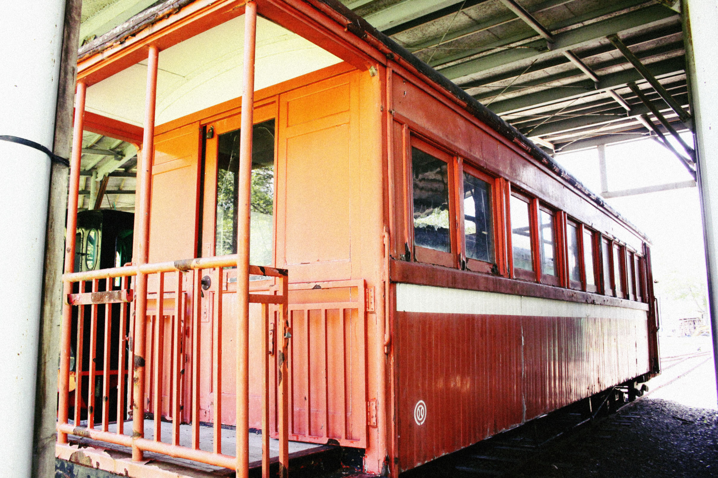 井笠鉄道ホハ18（両備・神高ナ19、西武35）。北海道遠軽町「丸瀬布森林公園いこいの森」で2014年撮影